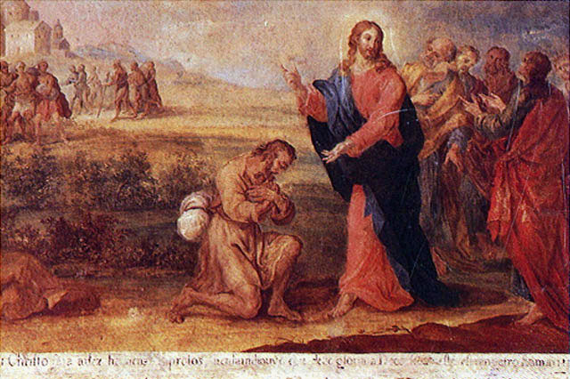 Milagre de Cristo